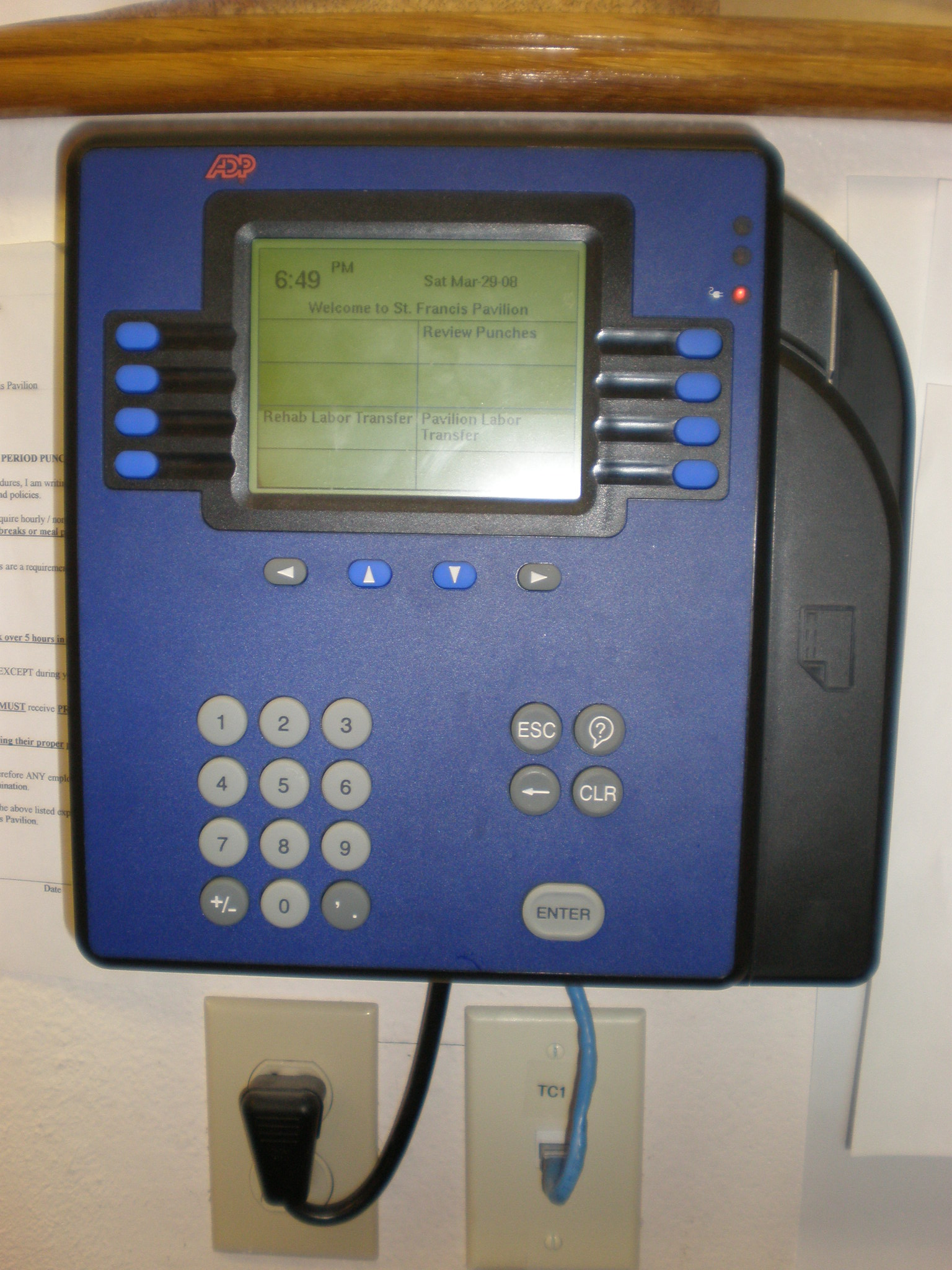 An ADP Model 4500 timecard reader